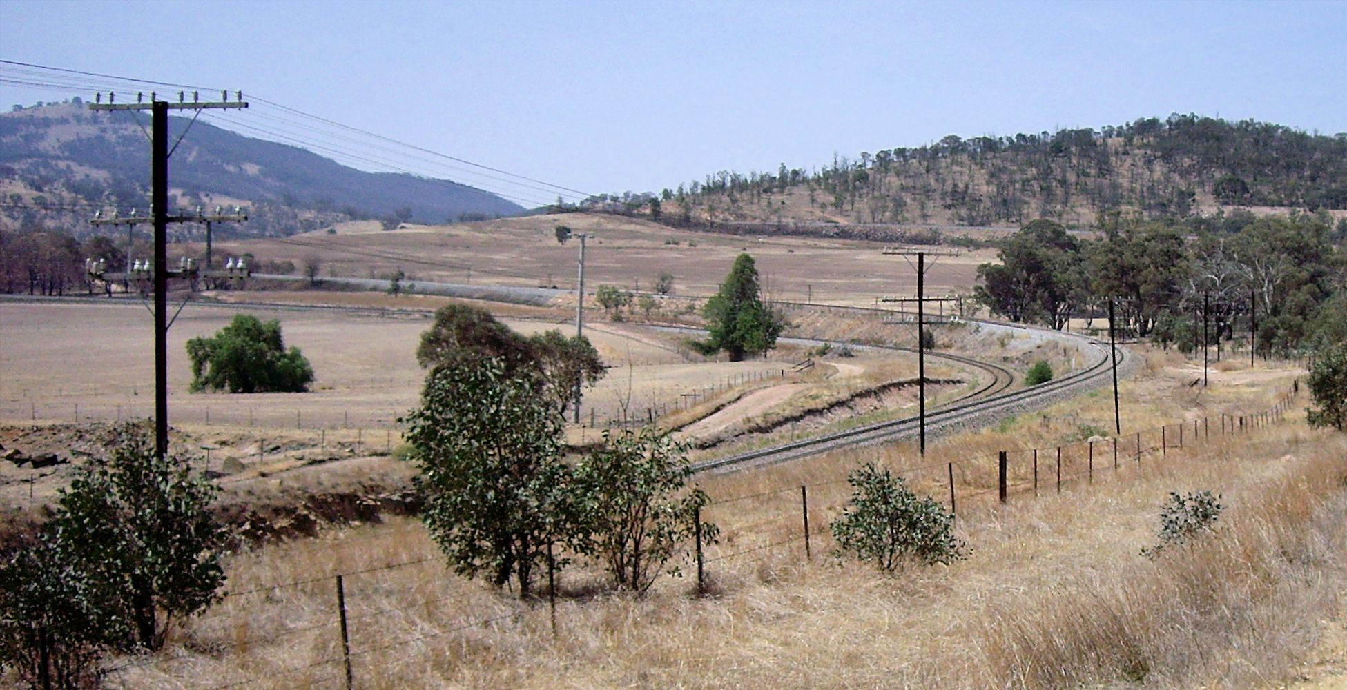 Bethungra Spiral